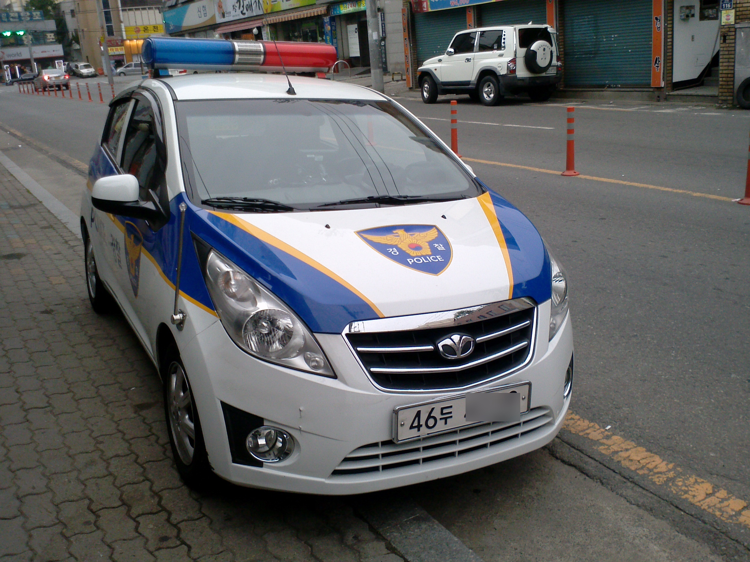 셰보레 스파크(마티즈 크리에이티브) 순찰차